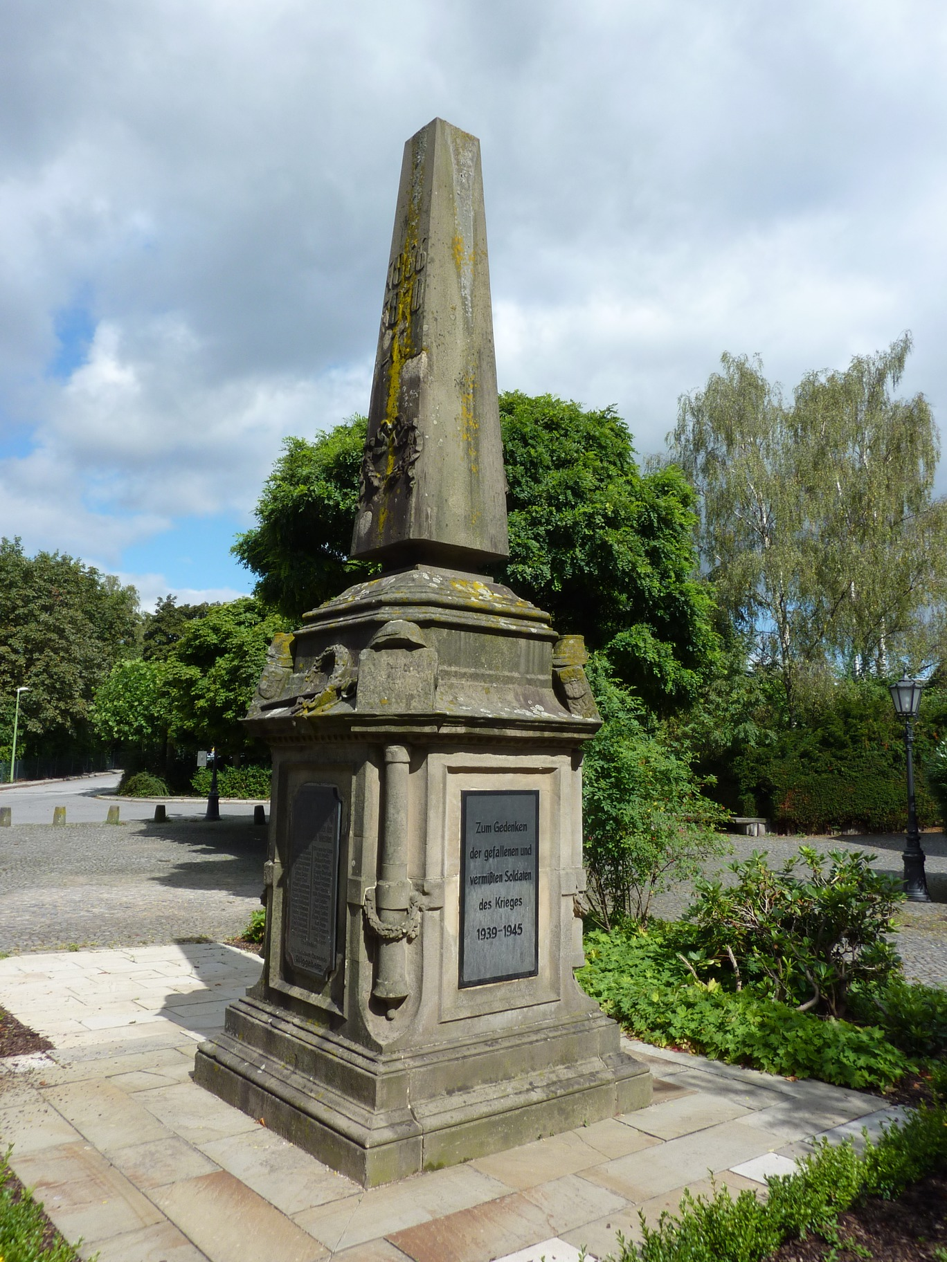 Kriegerehrenmal in Ennepetal-Rüggeberg This is a photograph of an architectural monument.